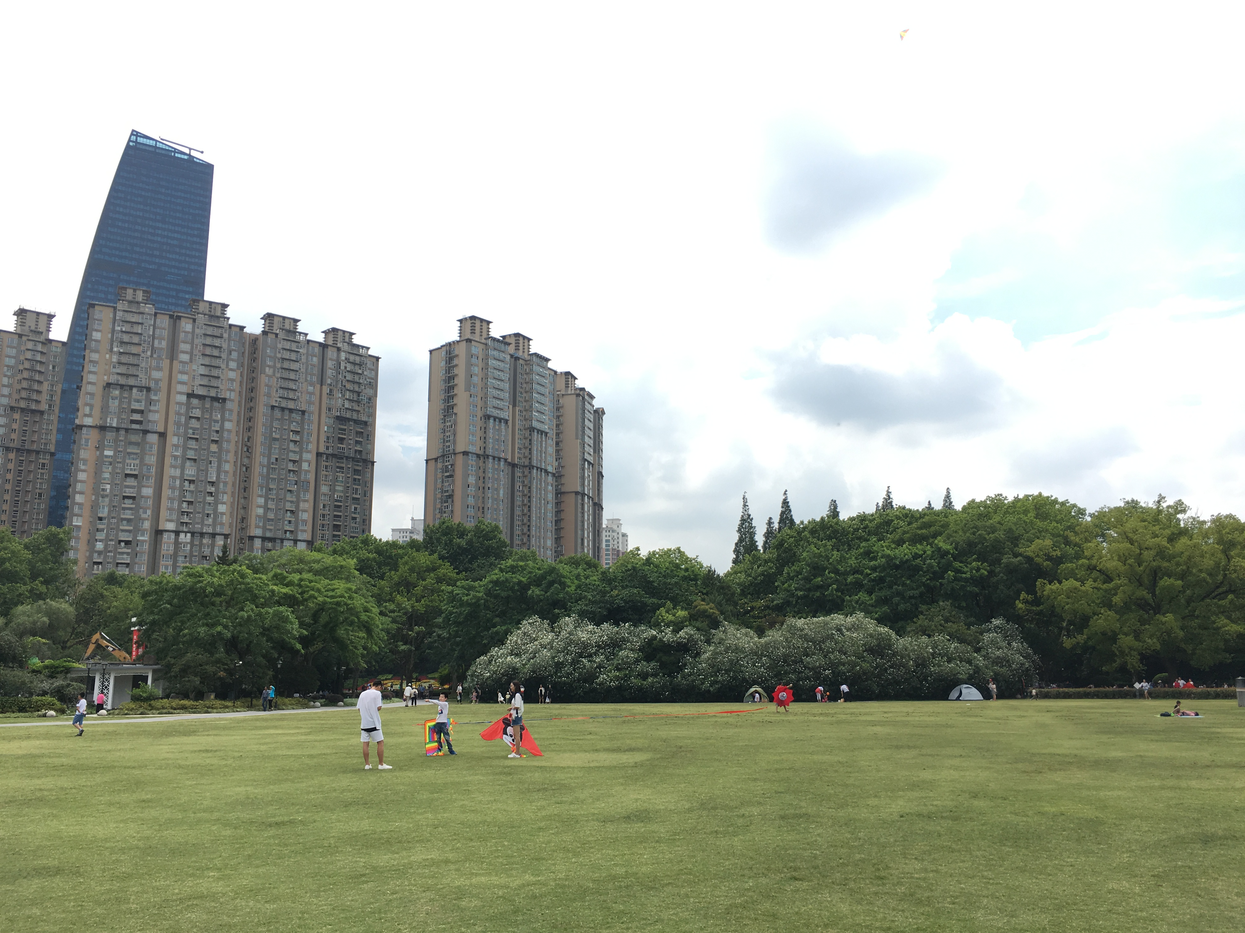 ShanZhongshan Park Shanghai, China, June 2018